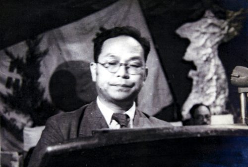 남북연석회의의 축사를 낭독하는 박헌영, 1948.04.05